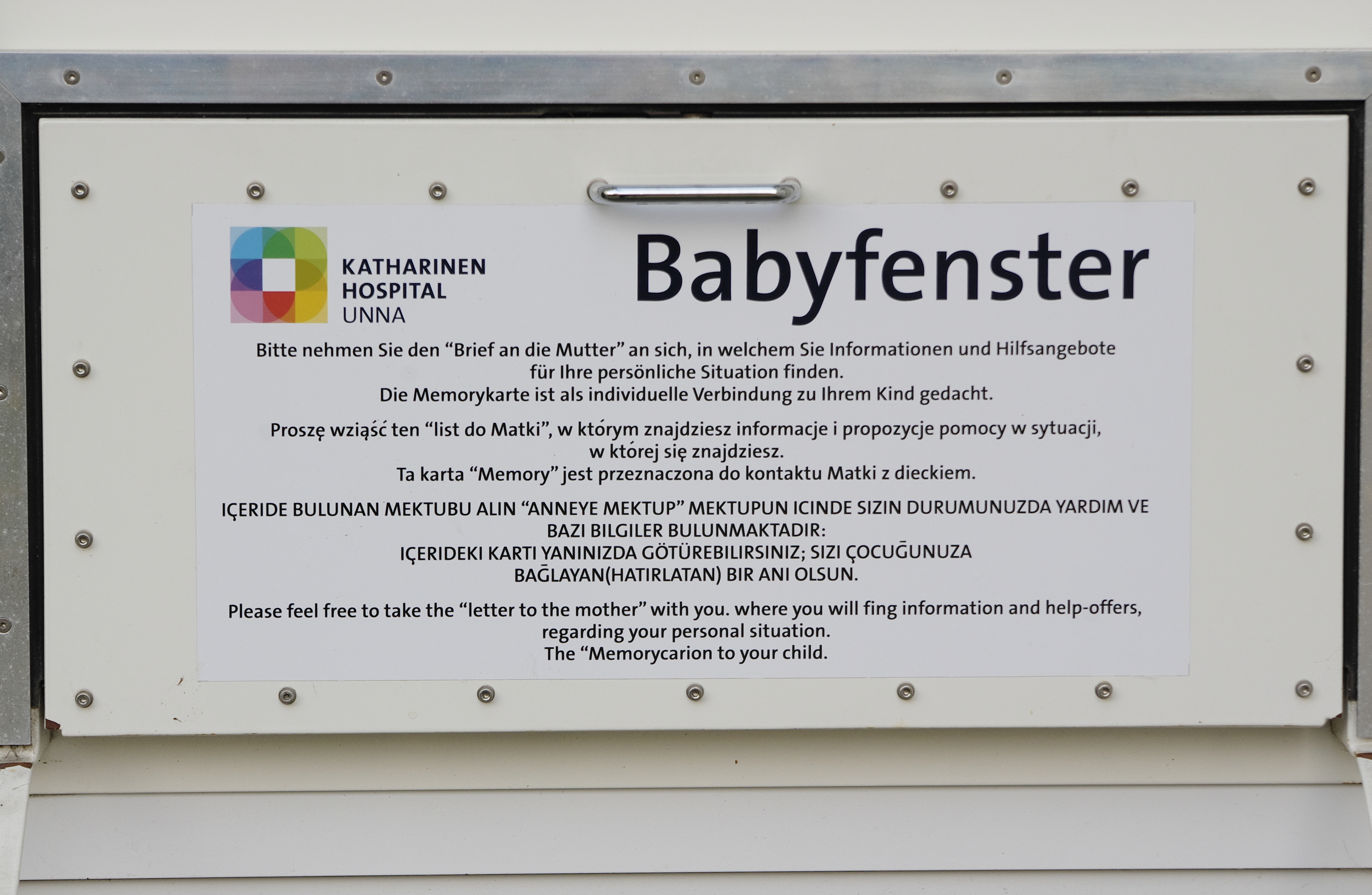 Babyfenster des Katharinenhospitals in Unna